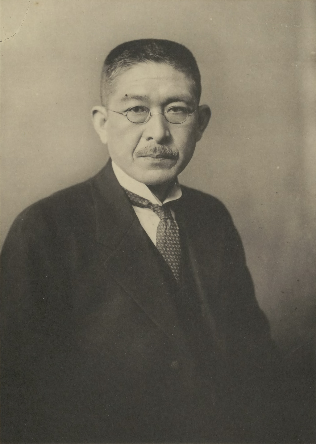 Portrait of Seki Hajime (関一, 1873 – 1935)